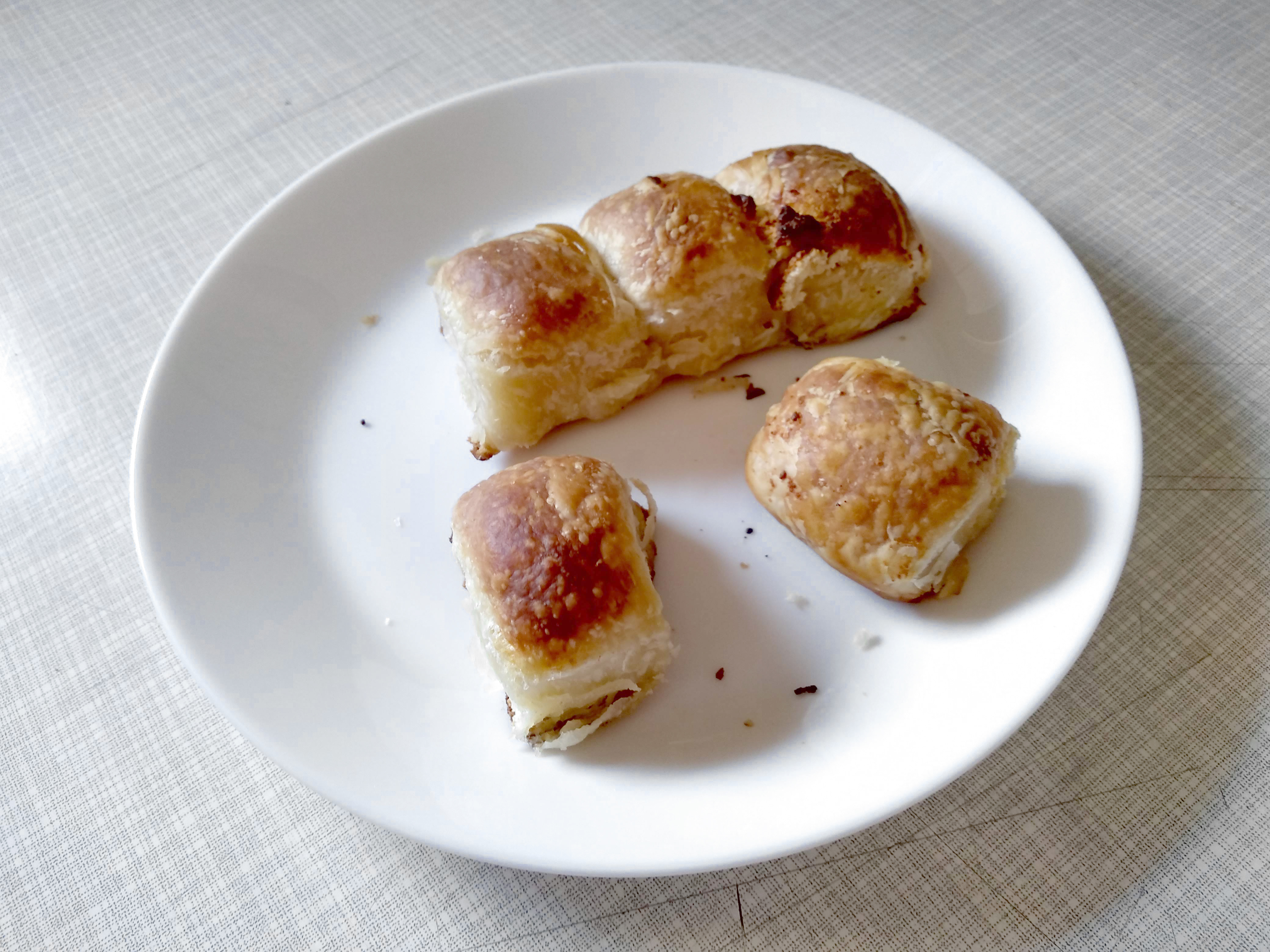 Srpski (latinica): Pazarske mantije - tradicionalno jelo i specijalitet Novog Pazara i Sandžaka